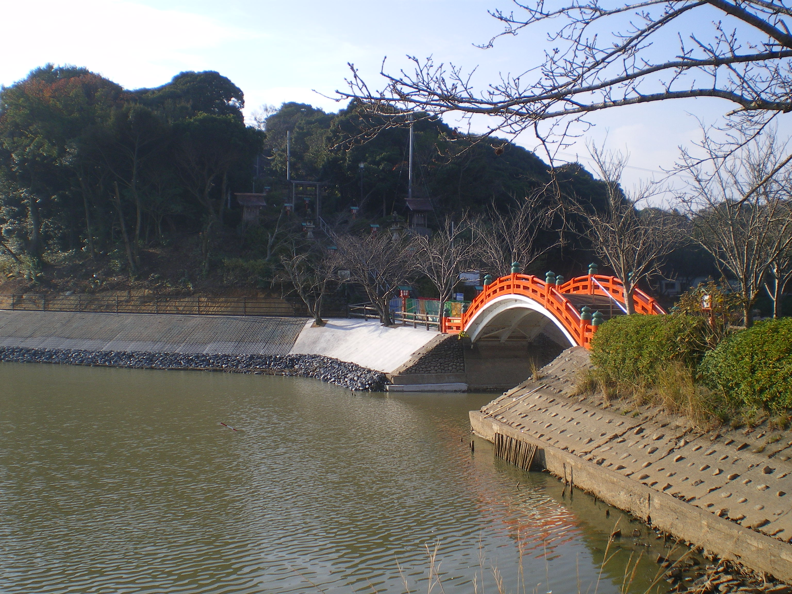 埴生公園（中間市）